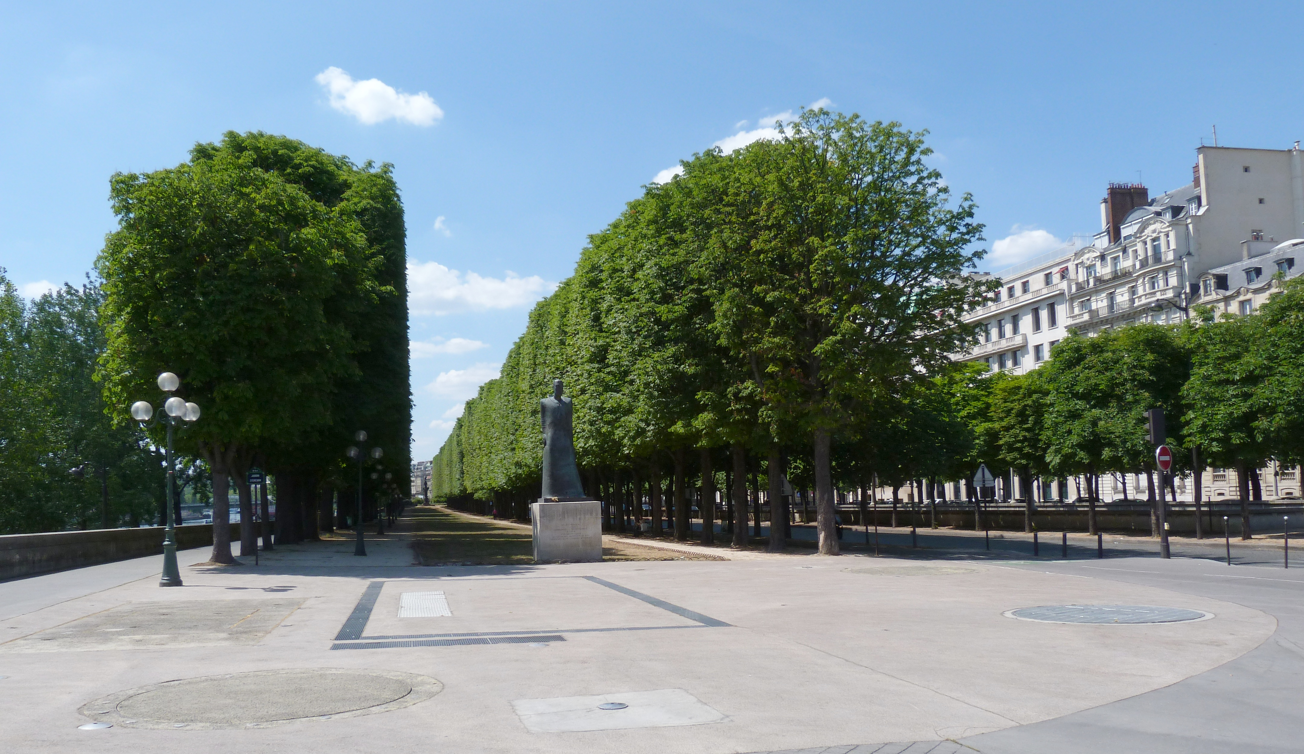 Cours Albert Ier (Paris, 8e arrond.) - Vue vers l'Ouest, de la place du Canada. Espace planté le long de la Seine (Jardin d'Erevan) avec la statue de Komitas (masquée) et au fond le monument Mickiewich.